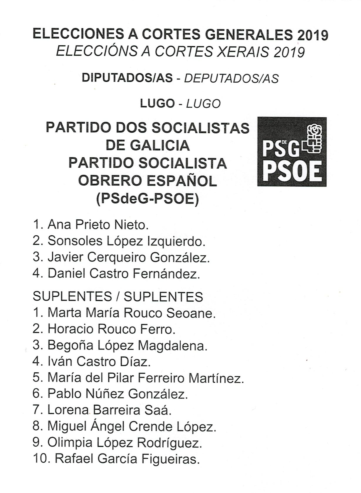 Eleccións a Cortes Xerais 2019 Deputados Lugo Partido dos Socialistas de Galicia Partido Socialista Obrero Español (PSdeG-PSOE)